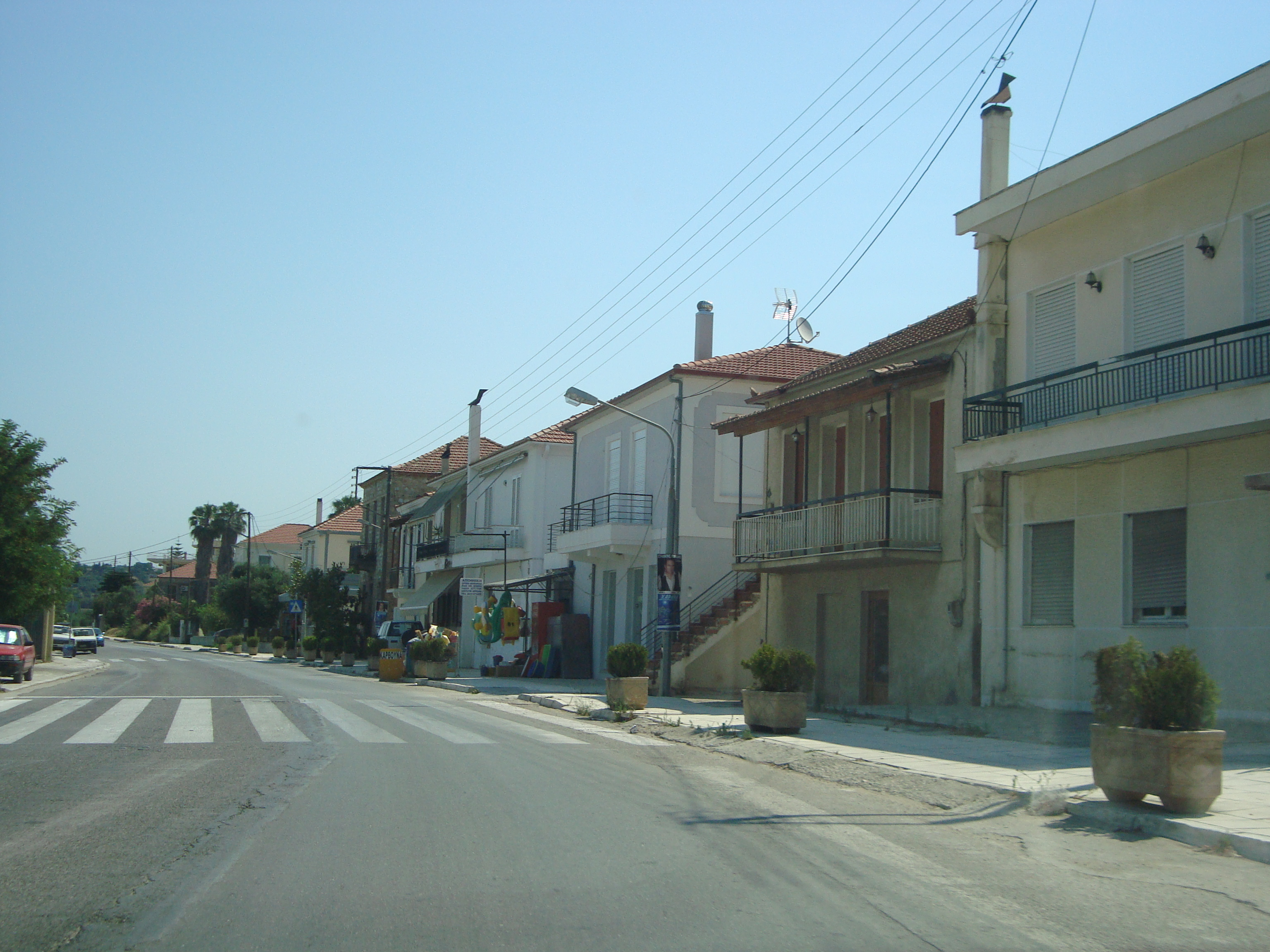 O Κεντρικός δρόμος των Βραχναίικων Αχαίας